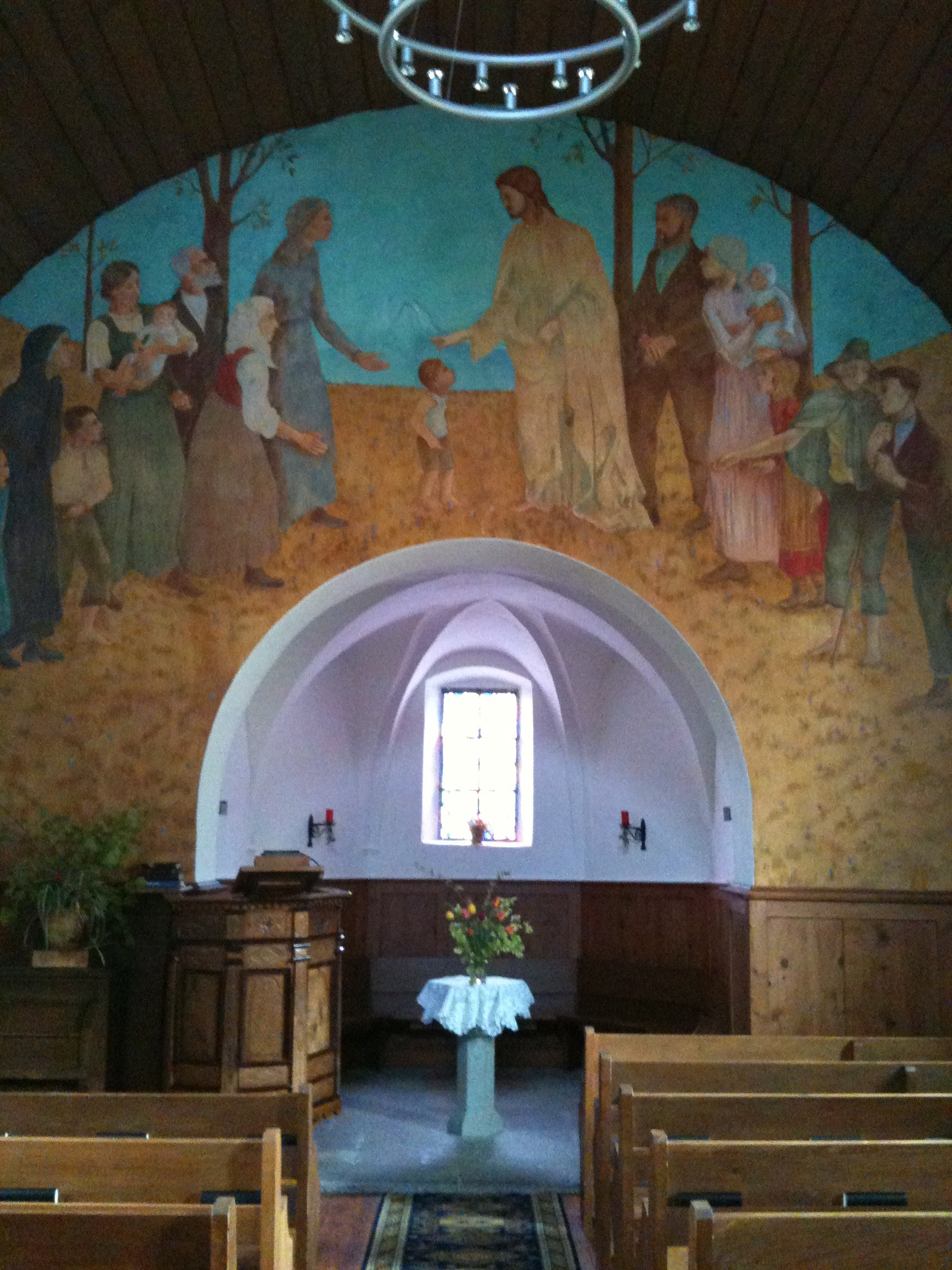 reformierte Kirche Flond, Kanton Graubünden